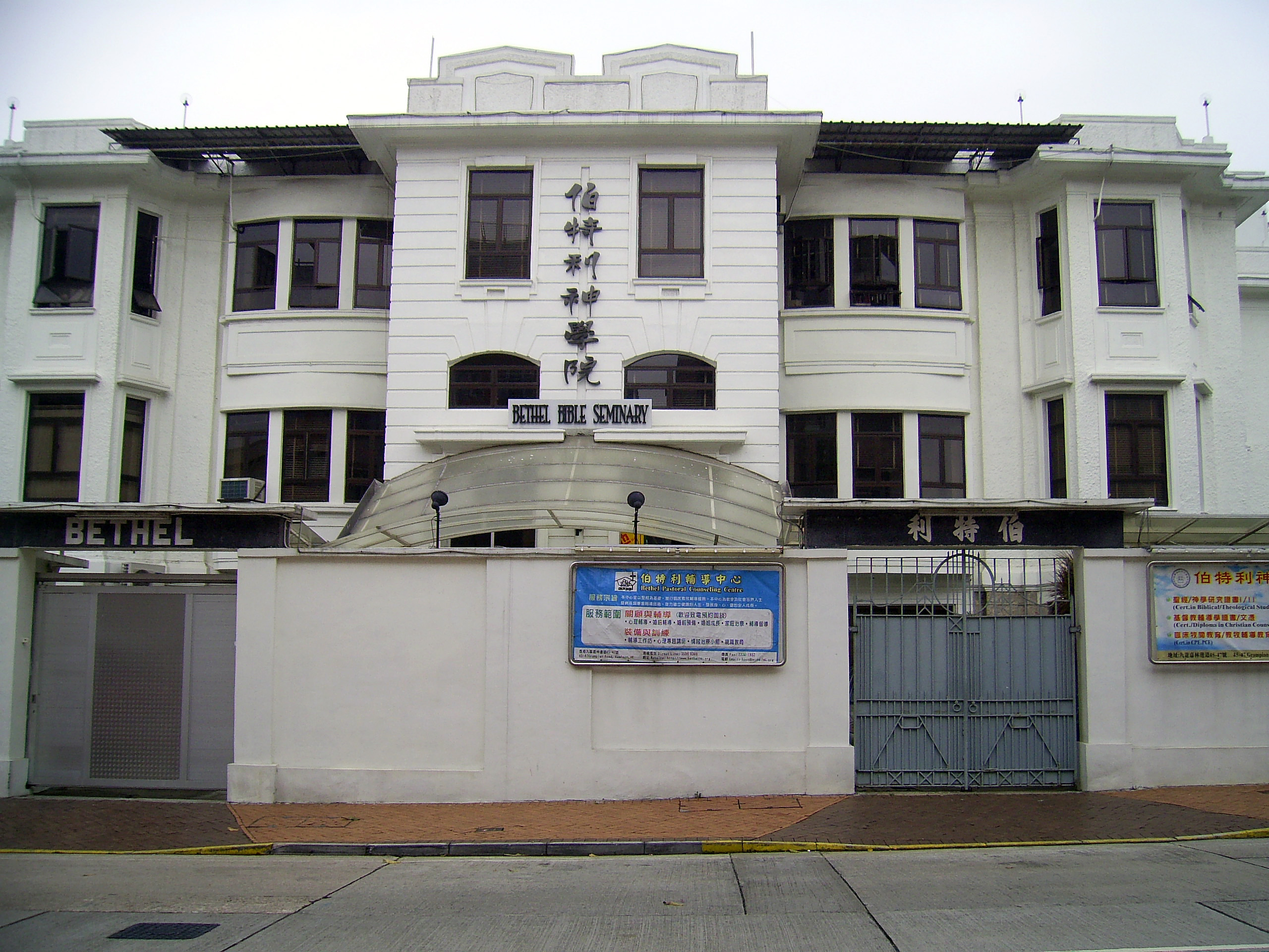 中文（香港）: 伯特利神學院